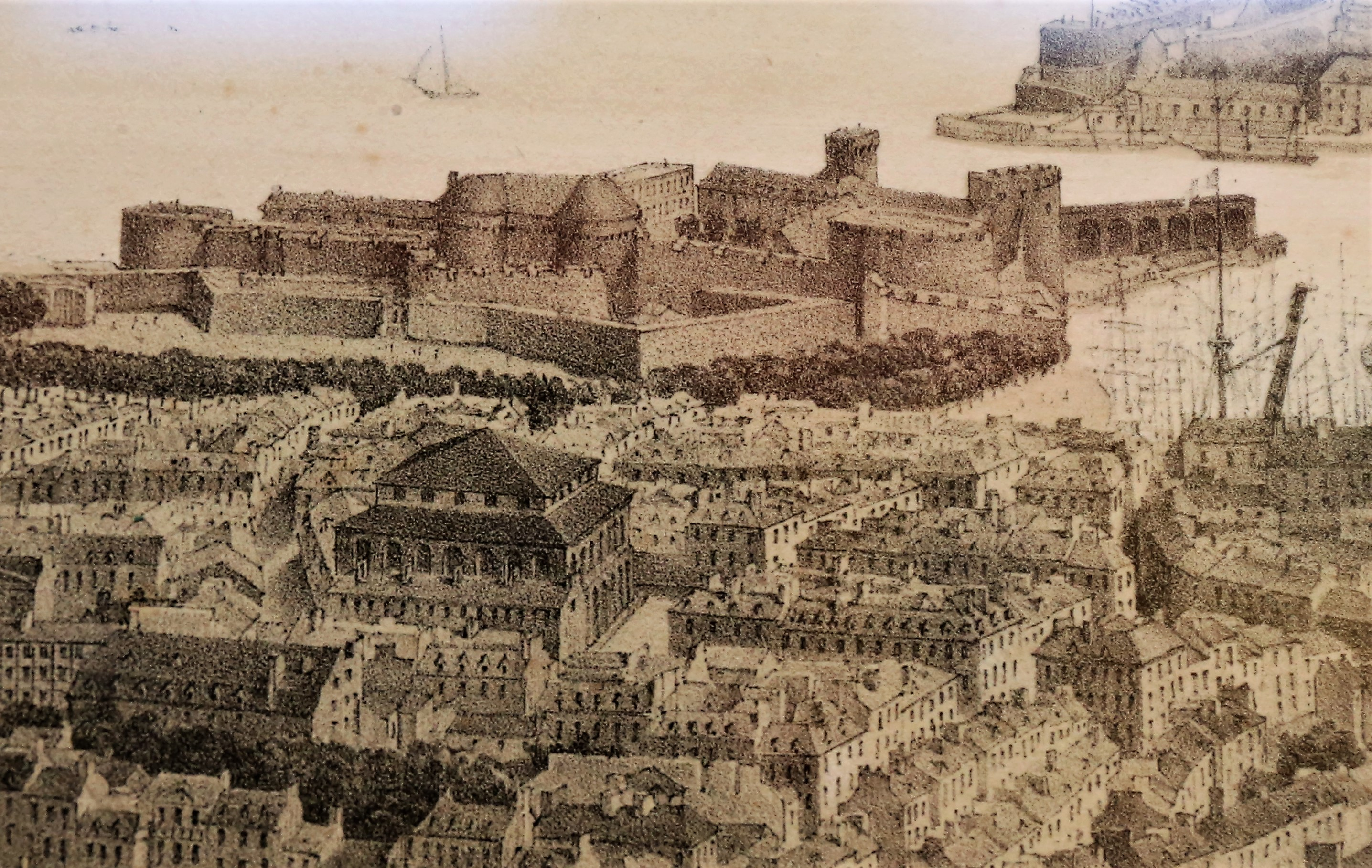 Lithographie de Brest, vue de la Ville et de la Rade prise des Glacis, par Alfred GUESDON (Nantes, 1808 – Nantes, 1876), Série Voyage aérien en France Collection Musée des beaux-arts de Brest métropole (Achat, 1964)